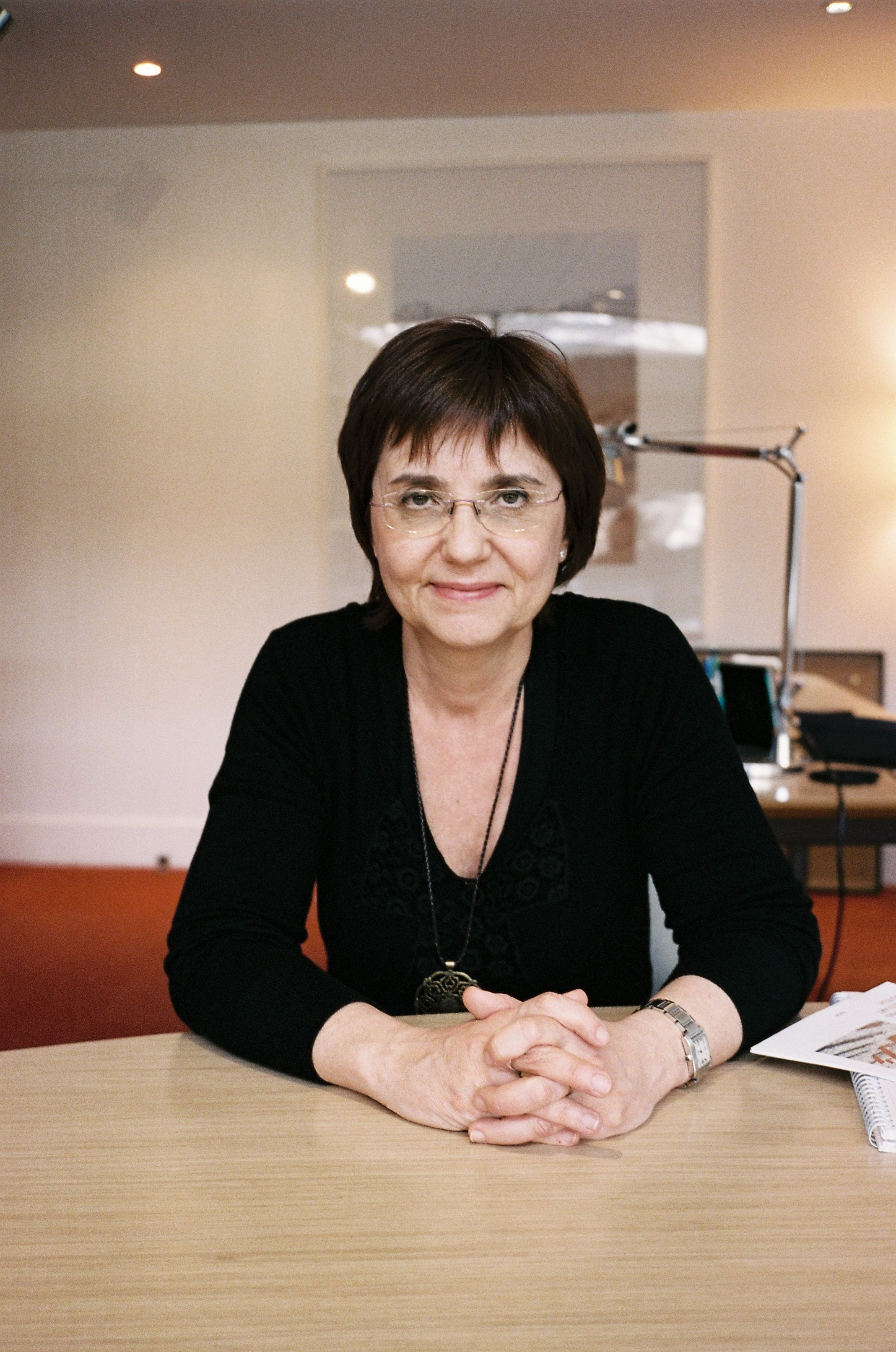 Marta Gili au Musée du Jeu de Paume en 2013